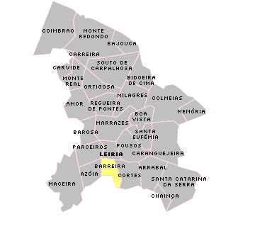 Localisation de Barreira.PNG sur la freguesia de Leiria.